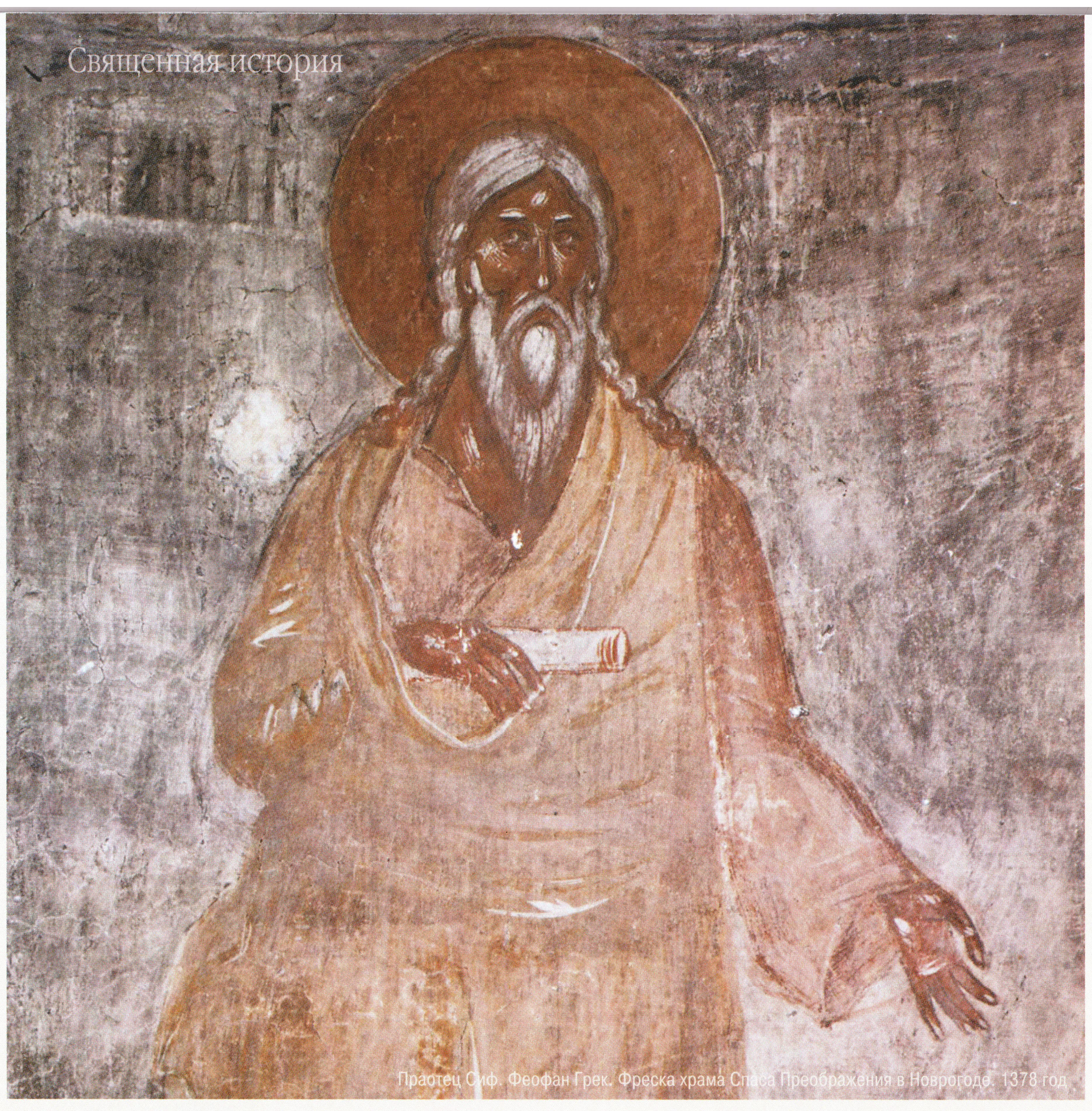 Феофан Грек. Праотец Сиф. Фреска православной церкви Спаса Преображения в Новгороде.